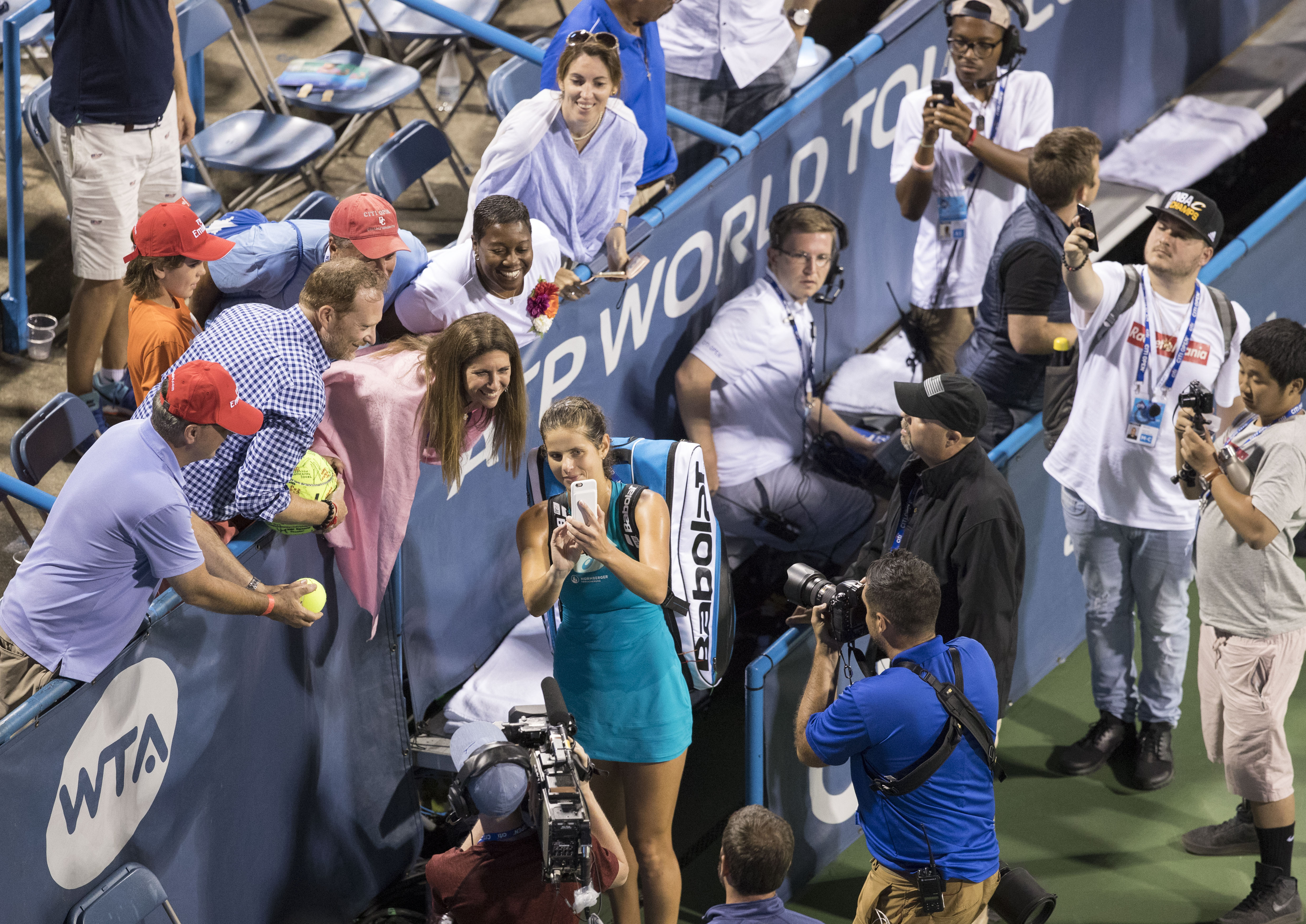 Citi Open Tennis 2017